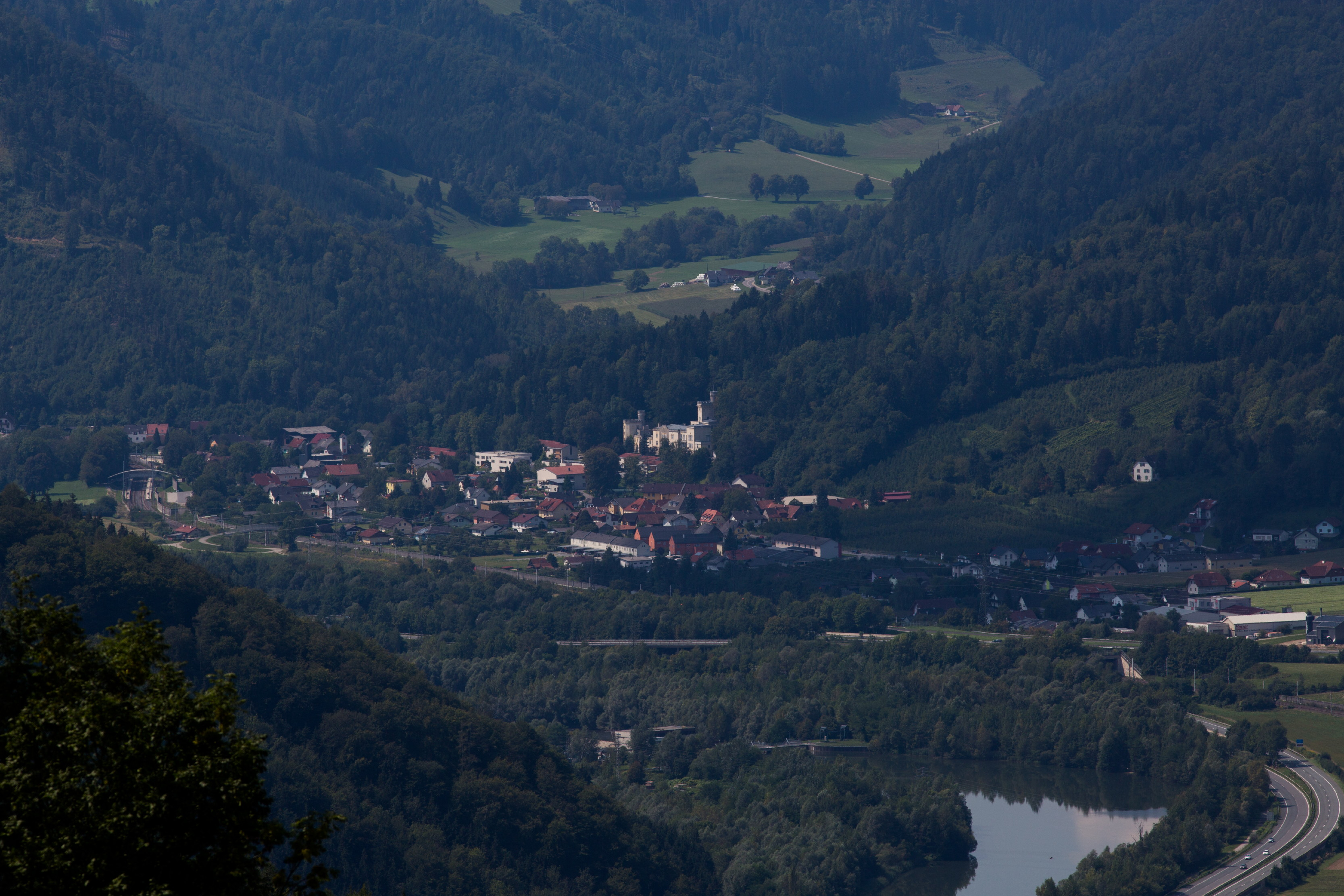 Kleinstübing, Steiermark, Austria